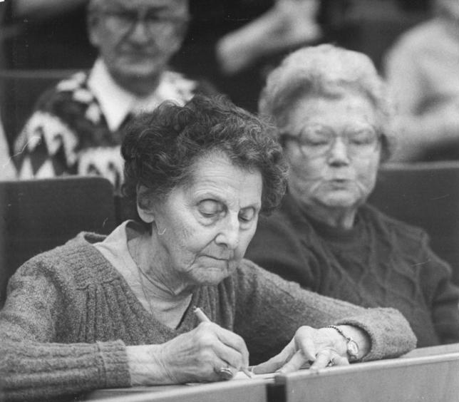 Leipzig, Universität, Senioren, Studenten ADN-ZB Grubitzsch 9.1.86 Leipzig: Veteranenkolleg-Mit 89 Jahren zählt Gertrud Schott zu den ältesten Studenten der Leipziger Karl-Marx-Universität. Die vitale Rentnerin, ehemals als Sachbearbeiterin tätig, besucht das Veteranenkolleg der Universität. 1100 Studenten im Rentenalter informieren sich dort in 30 Vorträgen über neue Forschungsergebnisse und Aspekte aller gesellschafts- und naturwissenschaftlichen Bereiche. (siehe 9N)